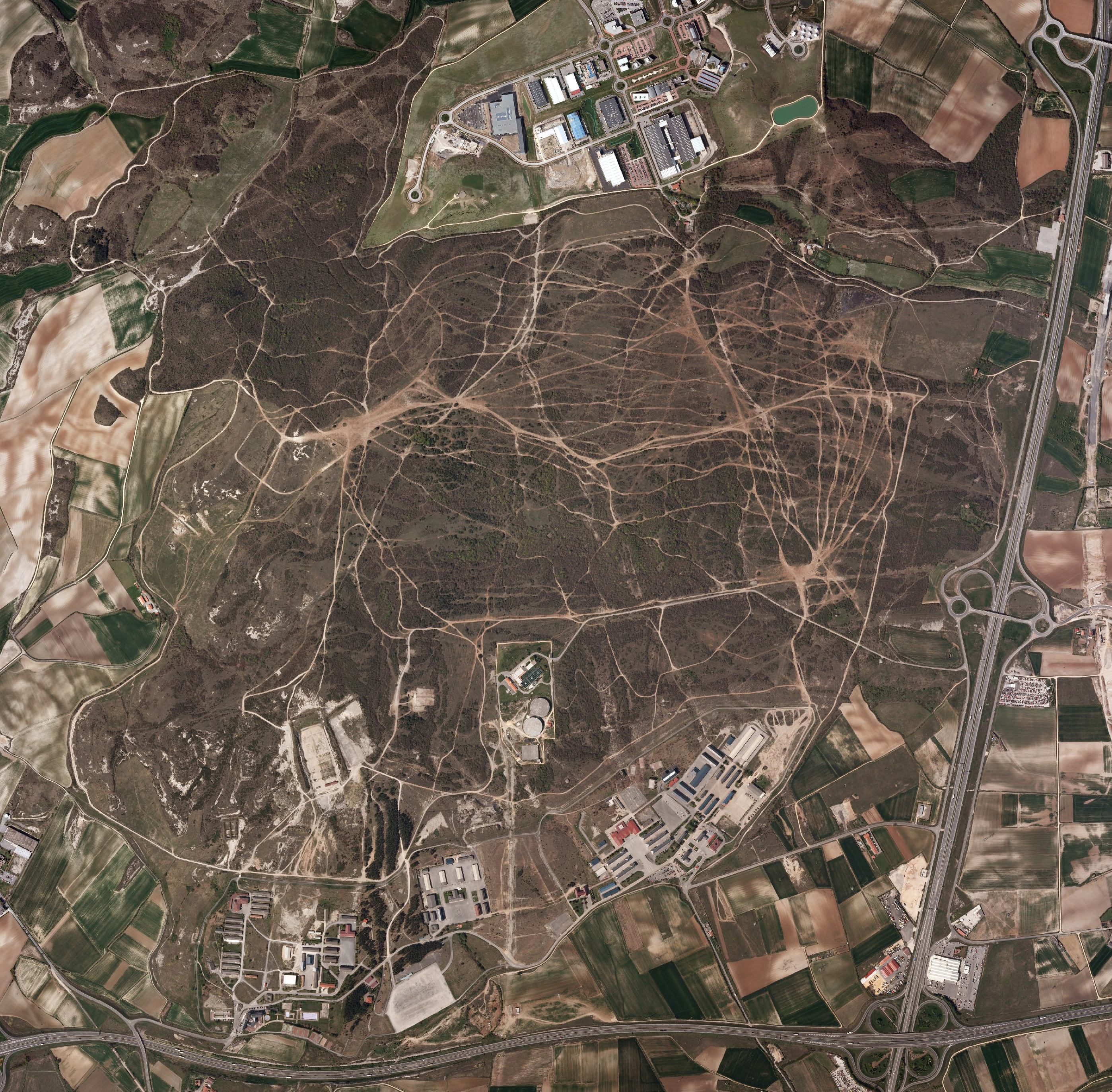 Gasteizko Arakako base militarraren ortoargazkia, 2009koa